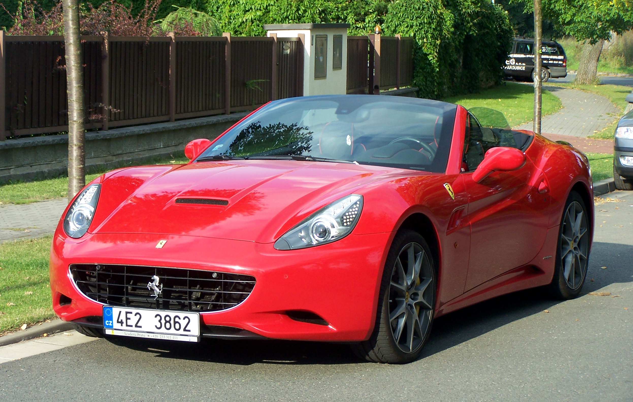 GPS: 50°0'44.654"N, 15°48'12.080"E